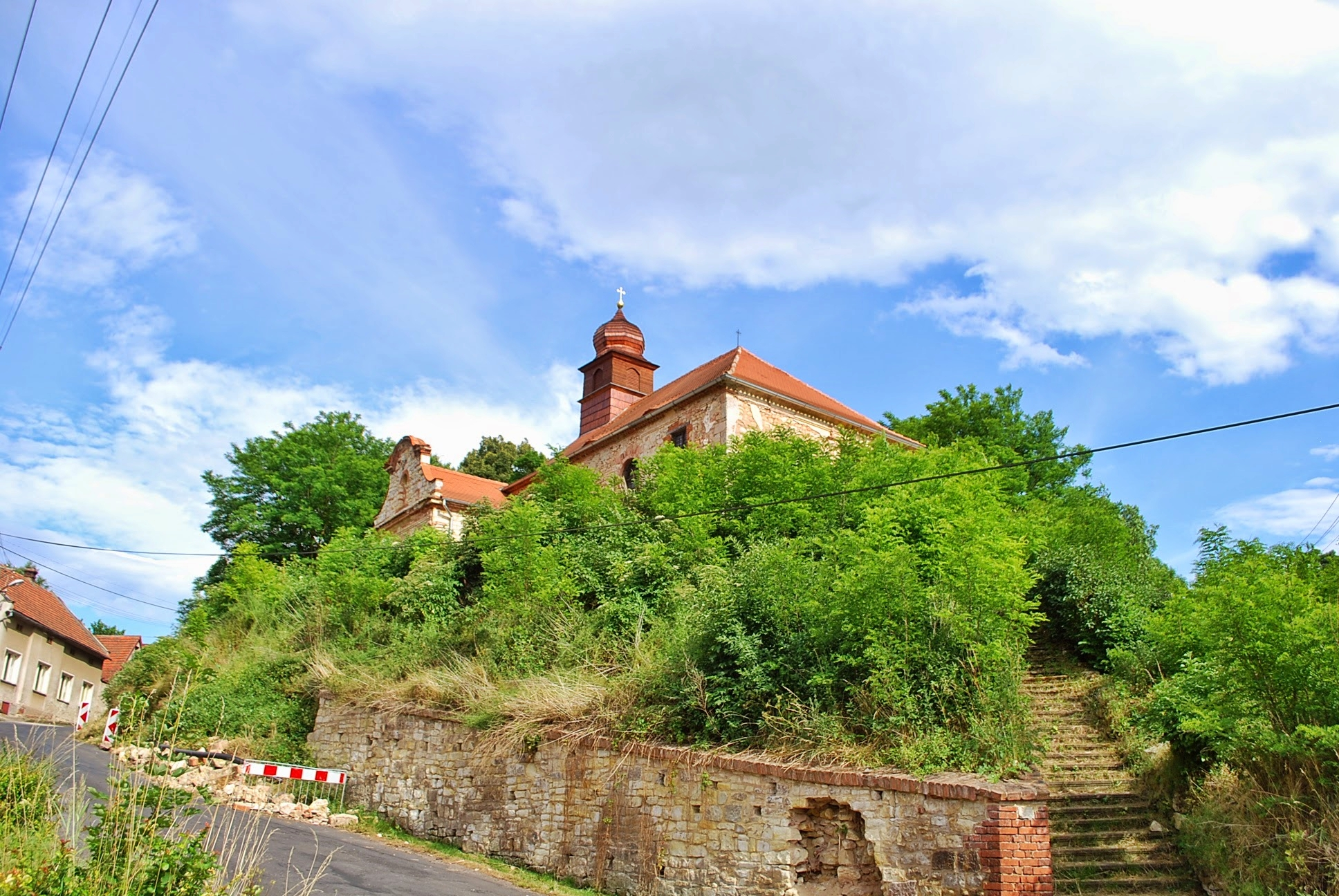 Kostela sv. Bartoloměje